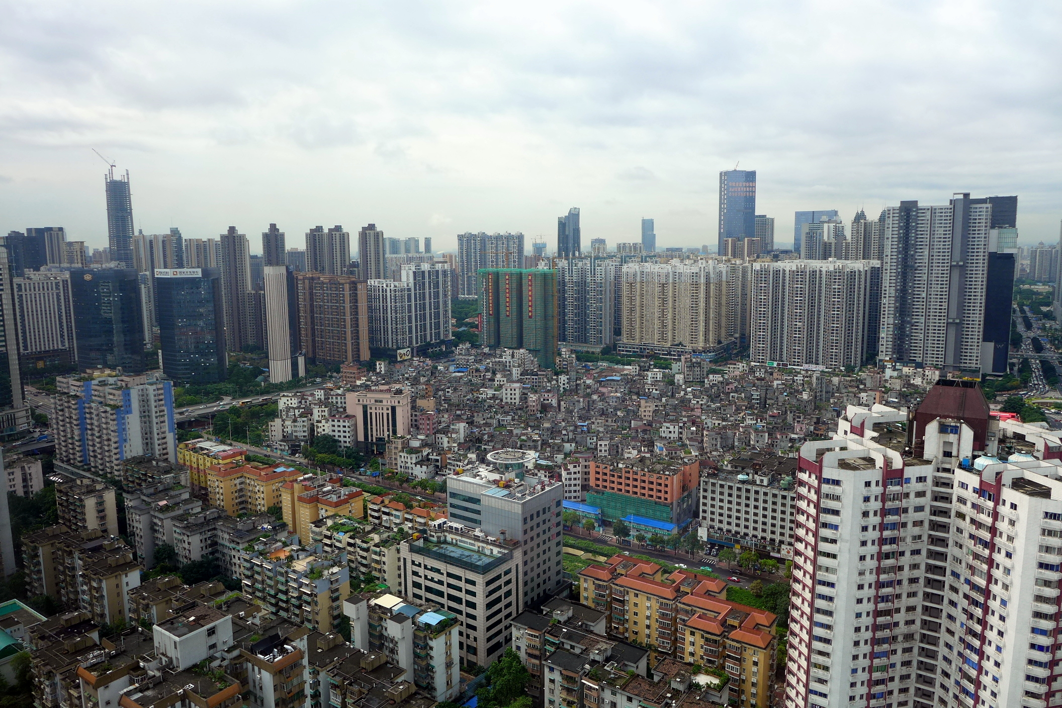 冼村